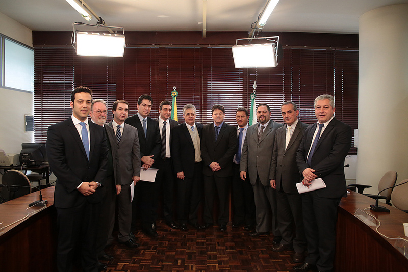 1ª Reunião da CPI dos Pedágios na ALEP/PR em julho de 2013.